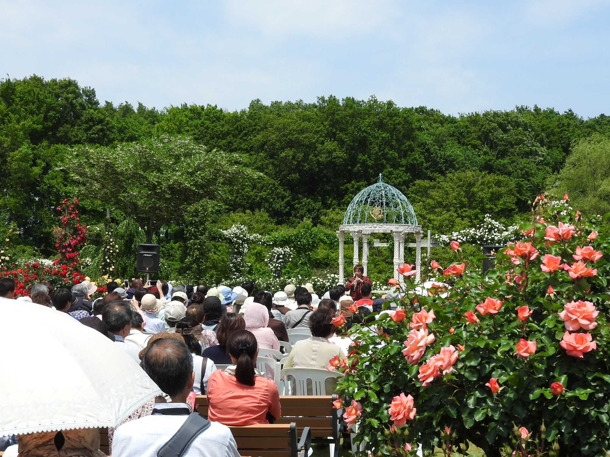 NakaoSodanshitsu氏による、京成バラ園 15 オーボエ・コンサート